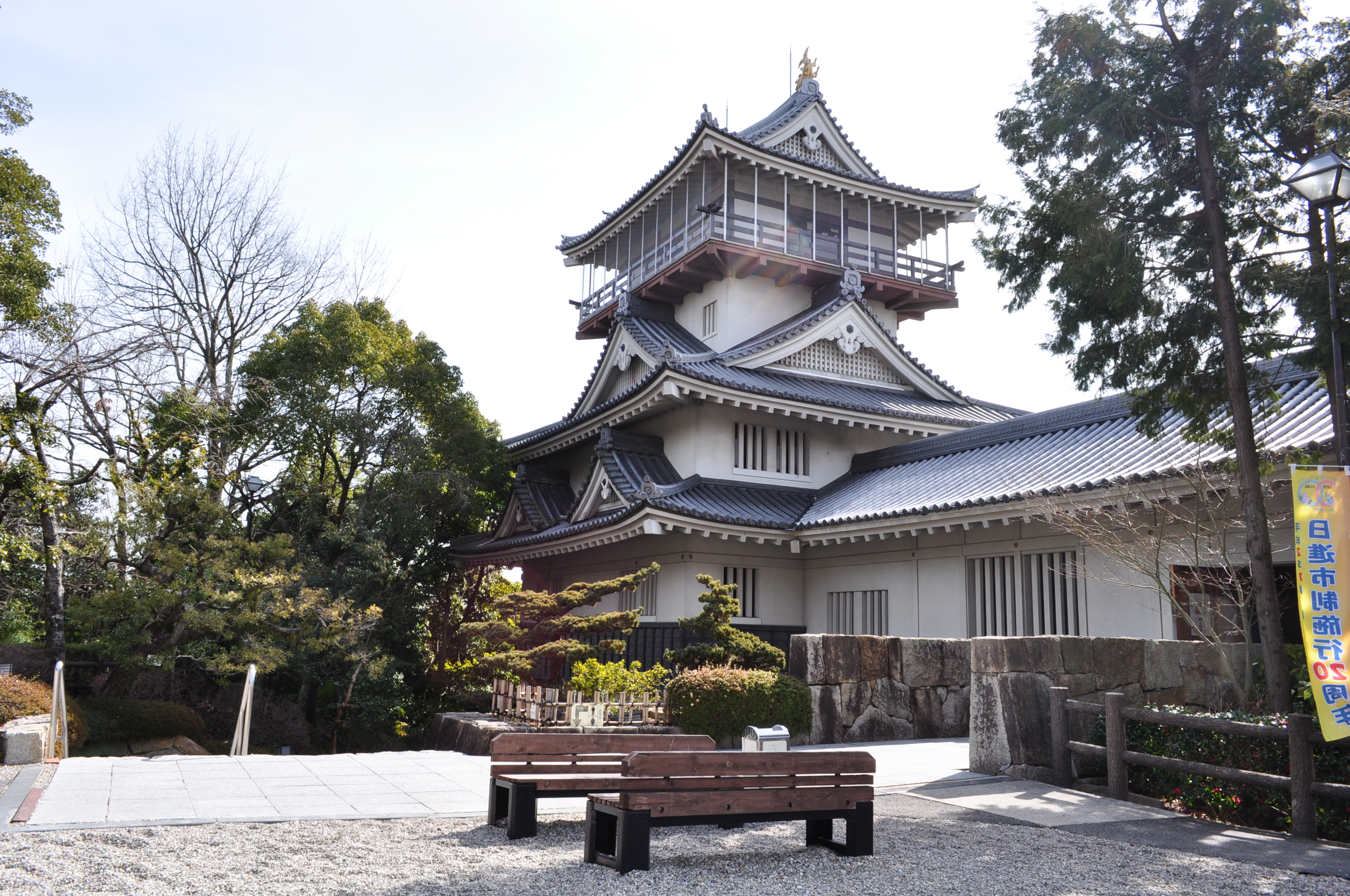 岩崎城址公園